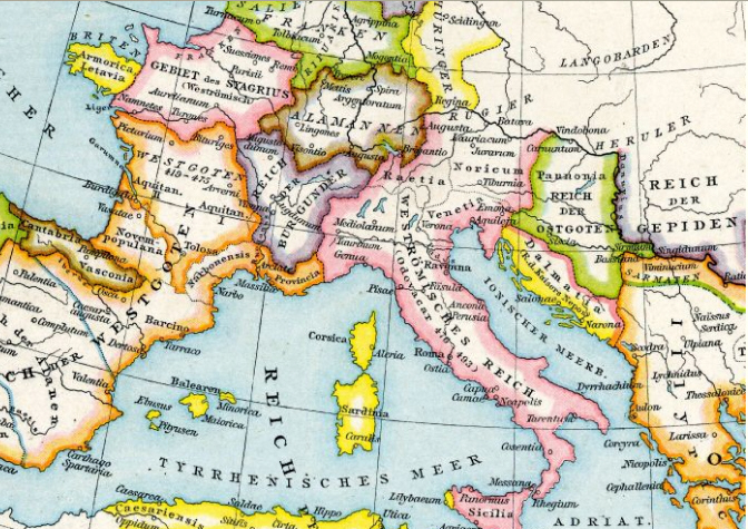 Allgemeiner historischer Handatlas: Westrom zwischen 450 und 476